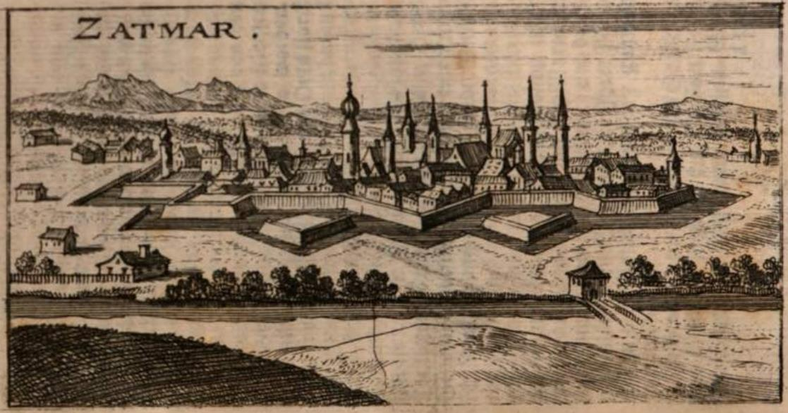 Szatmár vára a "Das ehmals gedrückte, vonm Türken berückte, nun trefflich erquickte Königreich Hungarn." című műből, Frankfurt u. Leipzig 1688